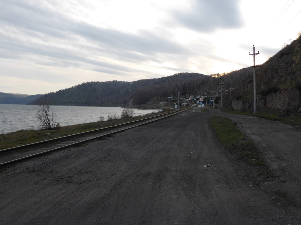 Village de Port Baïkal, Oblast d'Irkoutsk, Russie.